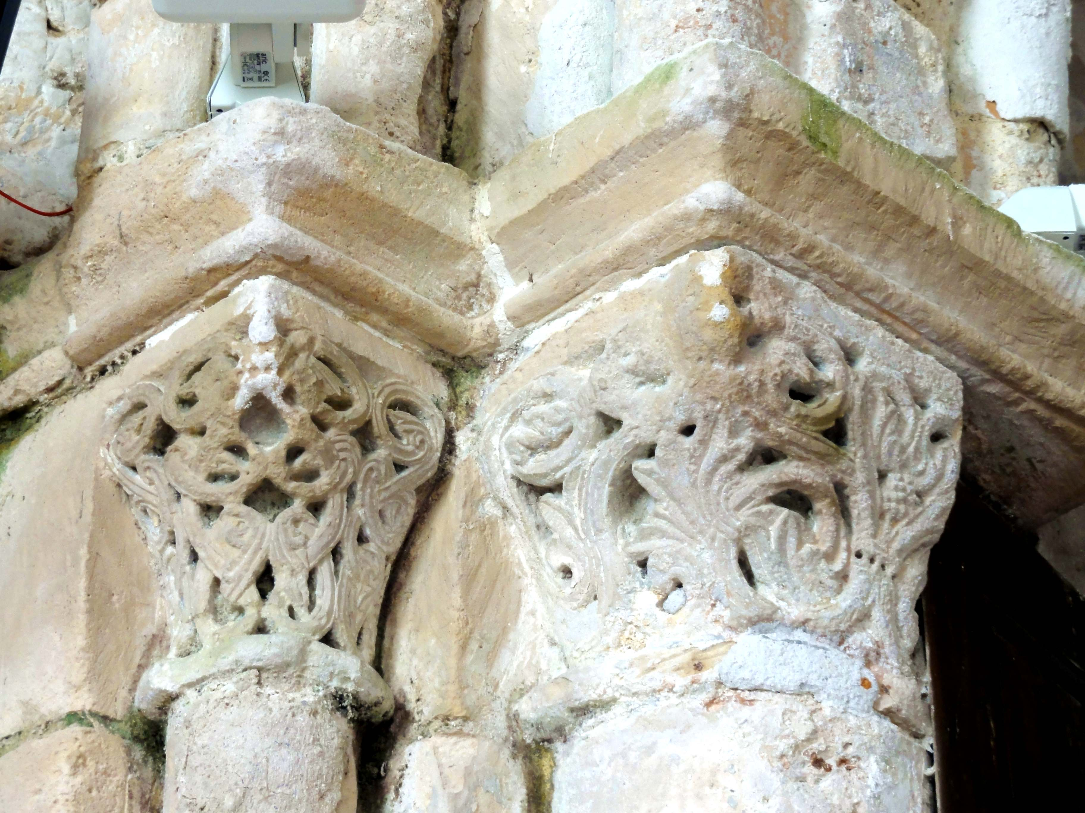 Chapiteau(x) ou cul-de-lampe - voir titre.